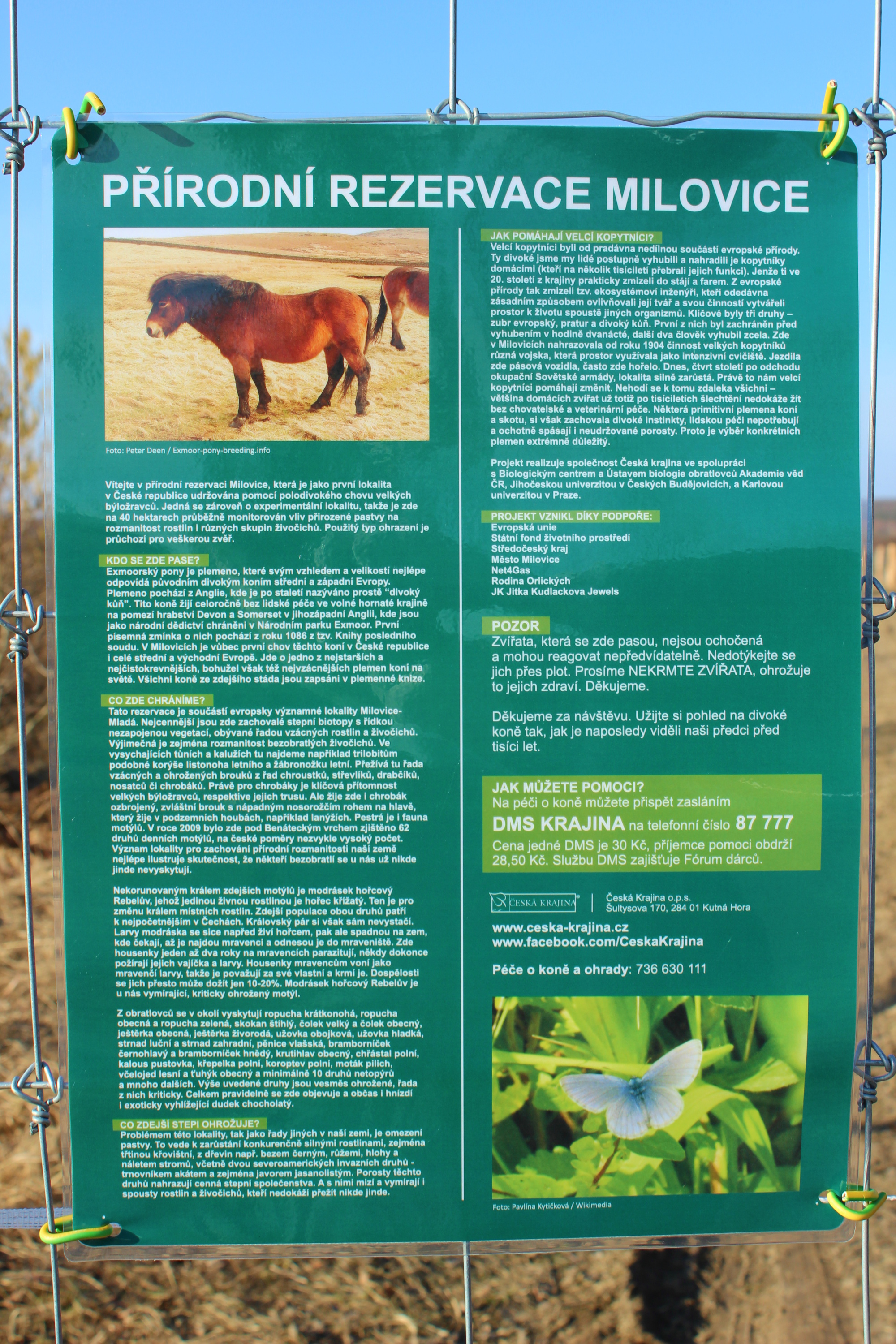 Exmoorští pony v Přírodní rezervaci Milovice.